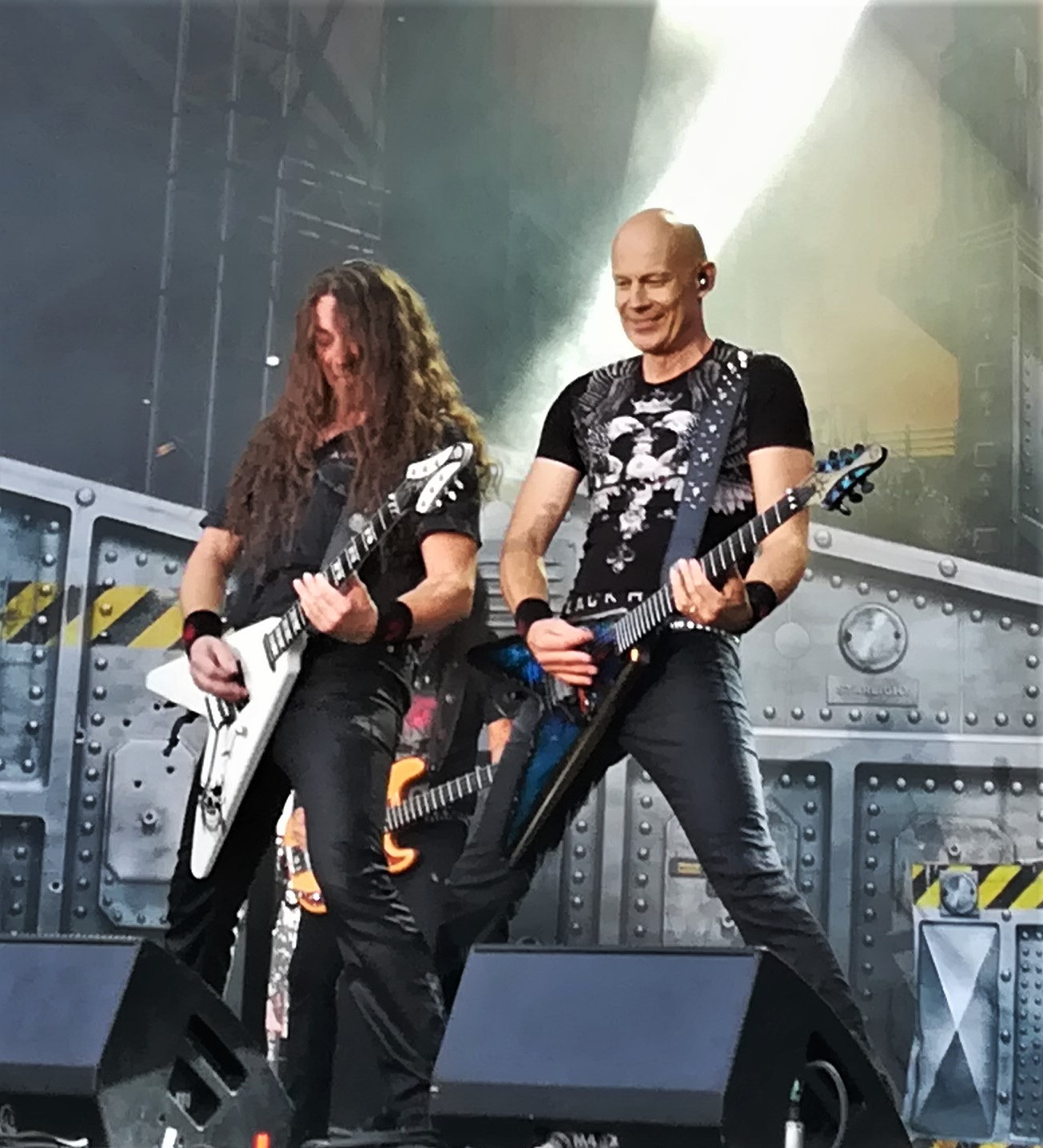 Wolf Hoffmann South Park festivaaleilla Tampereella. Kitarana Framus Wolf Hoffmann nimikkokitara, joka valmistettiin Rise of Chaos kiertuetta varten. Kuvassa vasemmalla kitaristi Uwe Lulis.